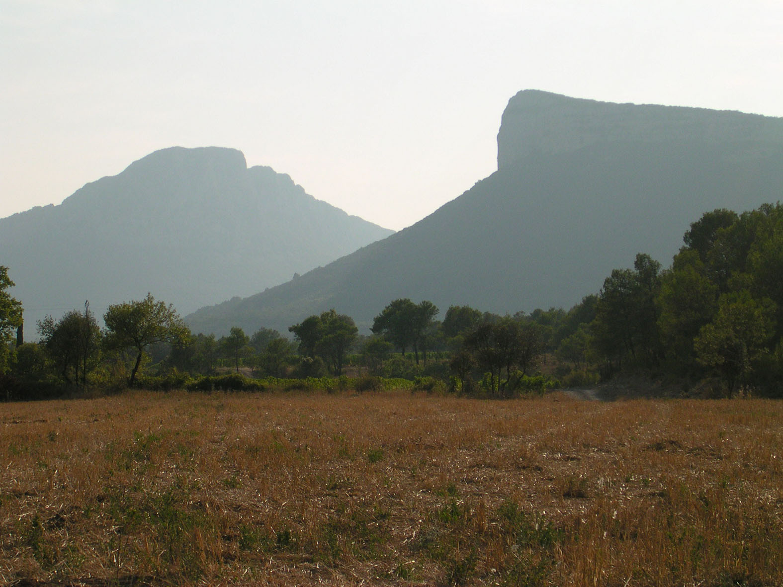 Valflaunès (France, Hérault)